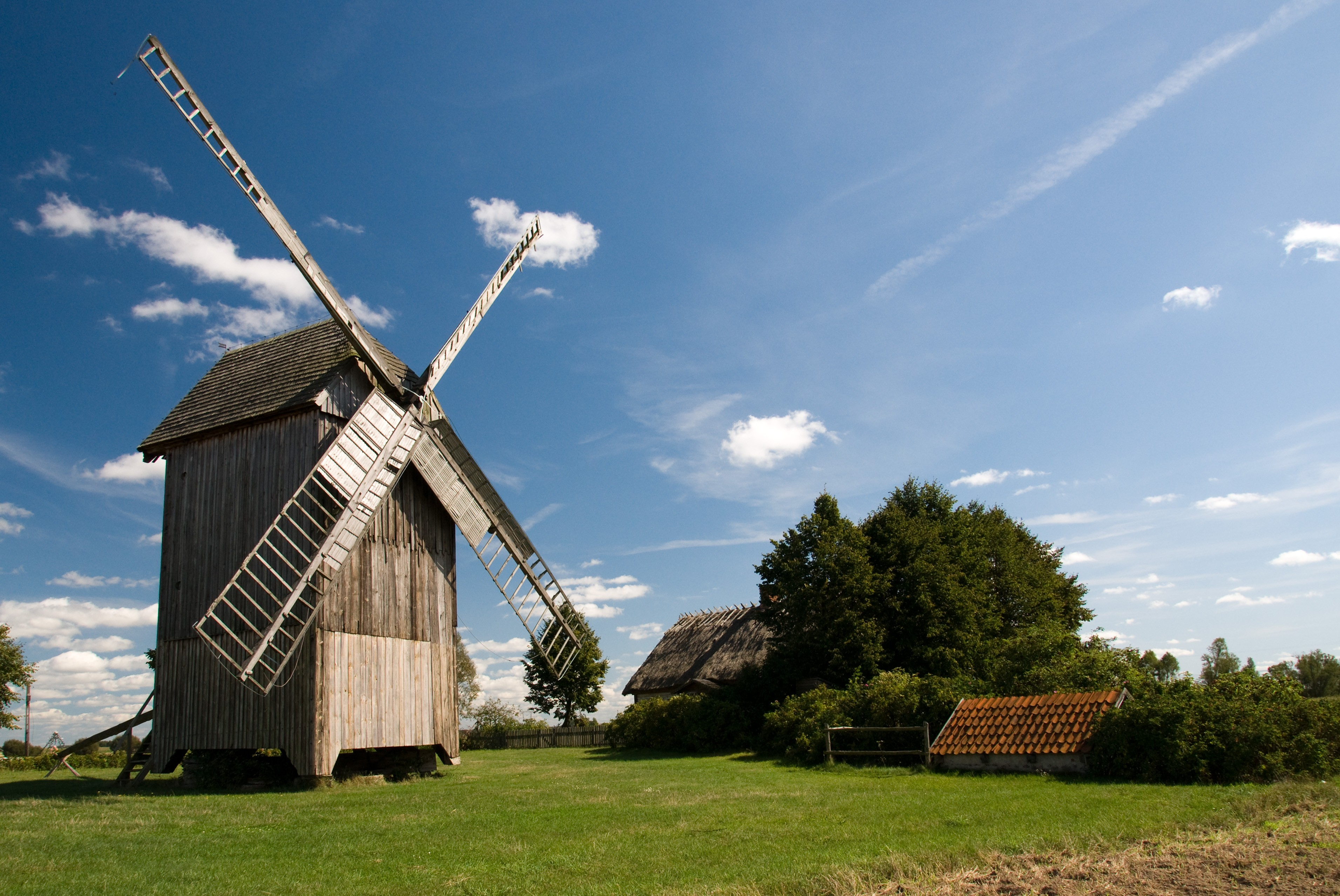 Zabytkowy wiatrak i chałupa w Drewnowie-Lipskim